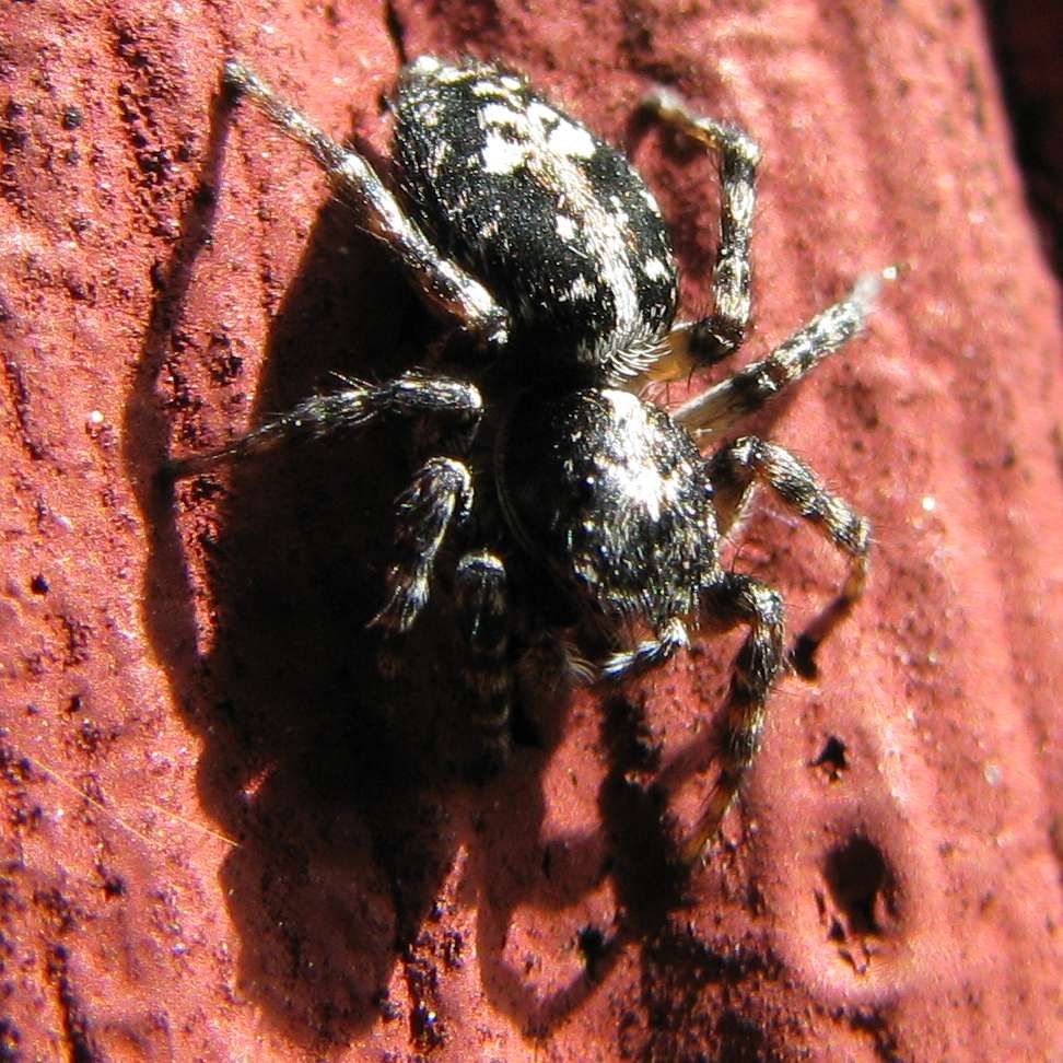 Hoppeedderkoppen Sitticus terebratus. Template:Byline